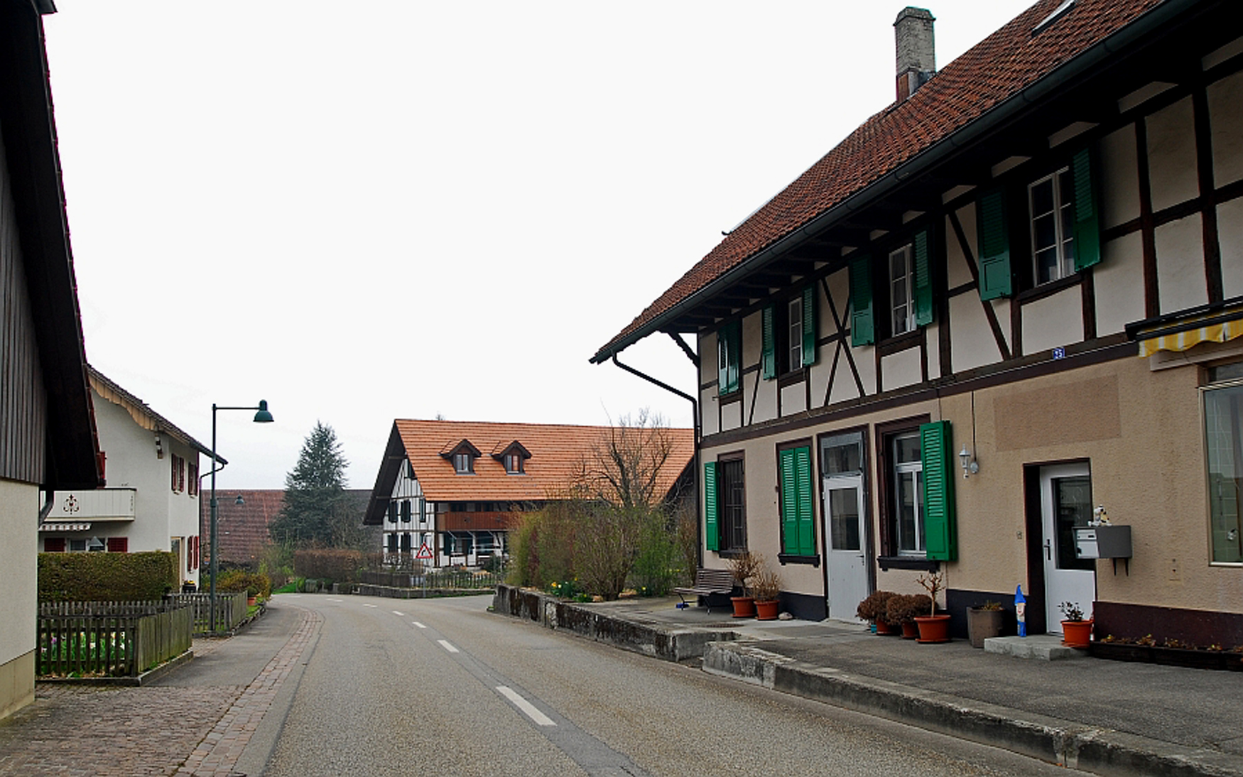 Hauptstrasse in Hersiwil, Kanton Solothurn